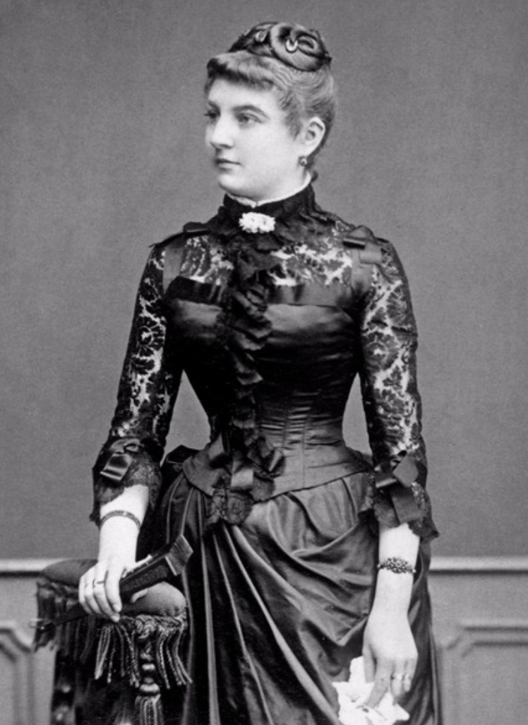 Zdenka Janáčková, esposa de Leóš Janáček (1885)